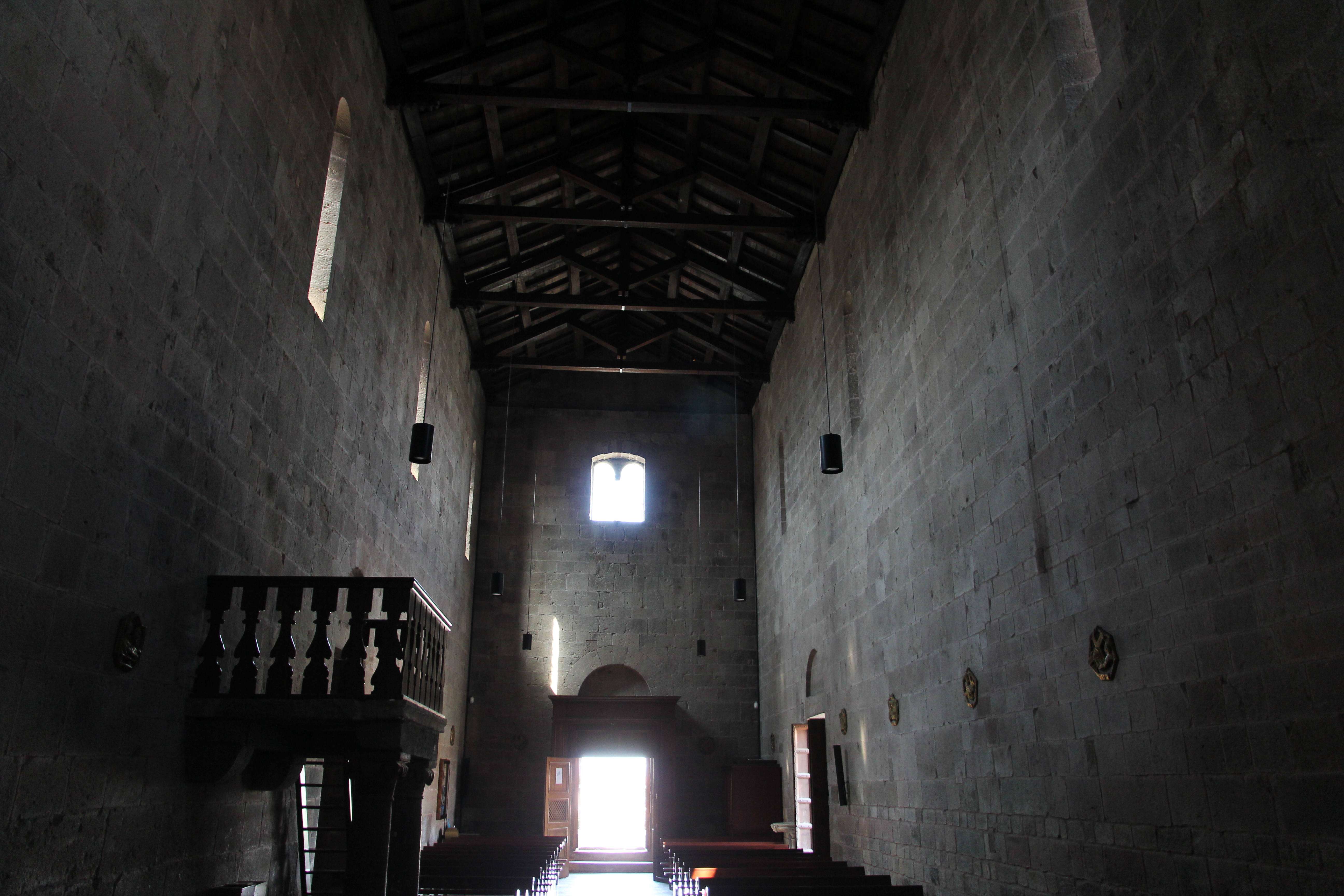 Ottana - Chiesa di San Nicola